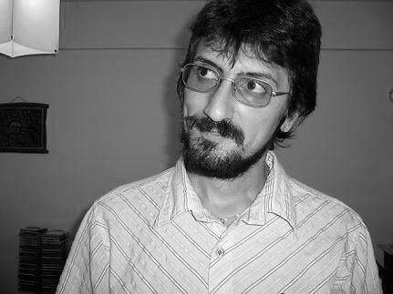 Fotografía en blanco y negro del músico pergaminense Pablo Read (n. 1977).